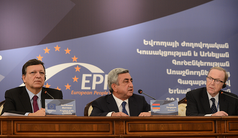 Serzh Sargsyan